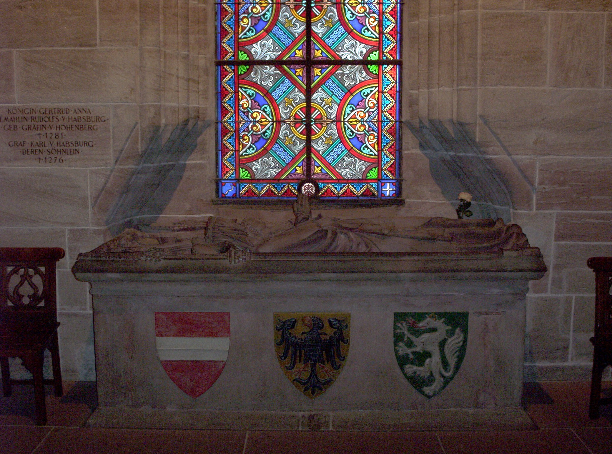 Sarkophag Gertrud von Hohenberg und Karl V. von Habsburg